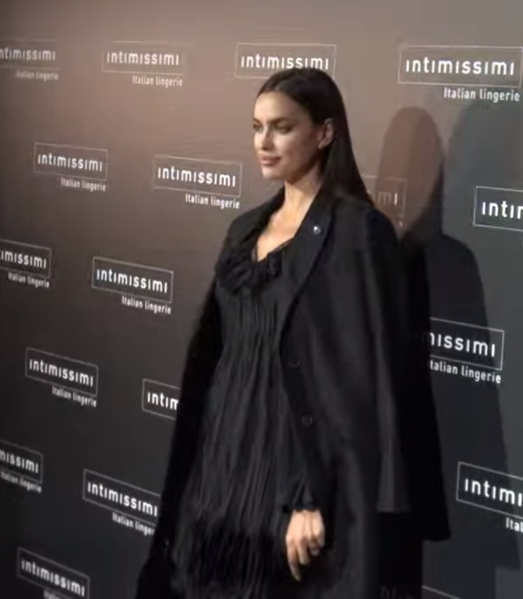 Intimissimi cumple 20 años y lo celebra por todo lo alto en Madrid con la visita de la cotizada modelo rusa: Irina Shayk.